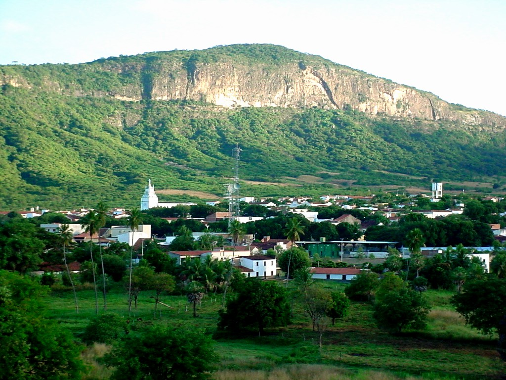 Foto realizada a partir do Alto das Pedrinhas (Ipu/CE), por Ricardo Martins AragÃ£o, em Junho de 2004.